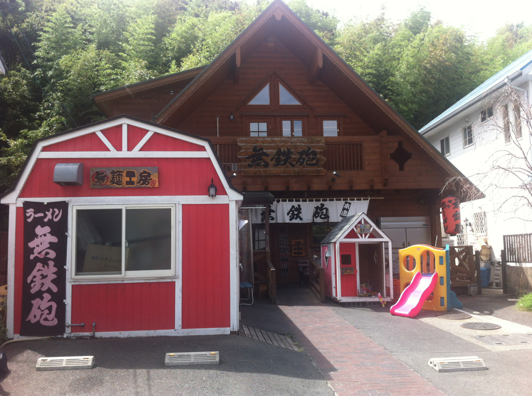 無鉄砲京都本店の外観。